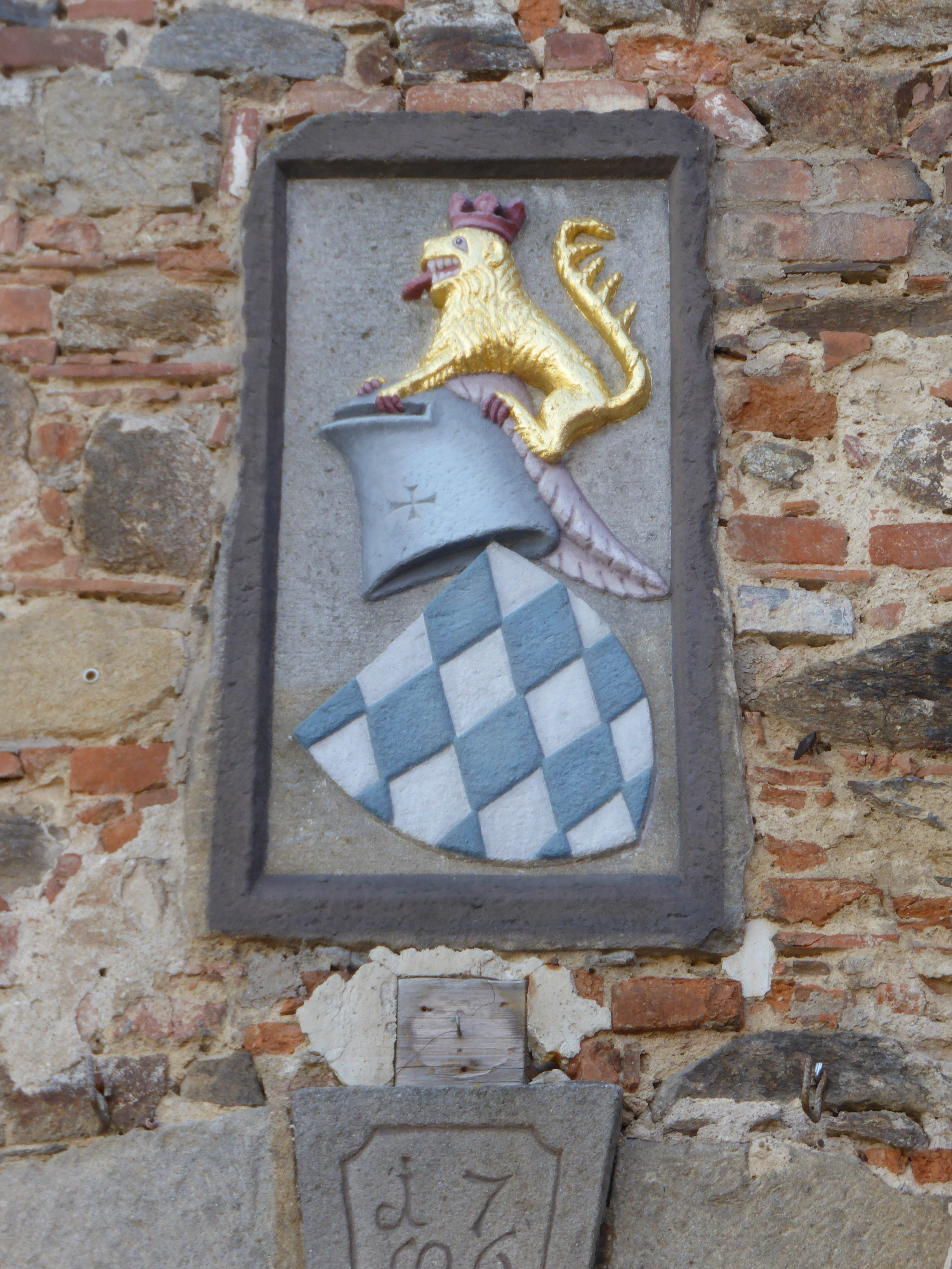 Schloss Burgtreswitz (Moosbach)